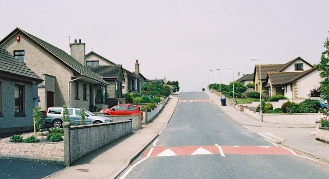 Modern housing in St Fergus, Aberdeenshire